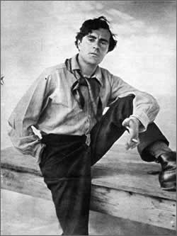 描述摘要 / Modigliani in Firenze.